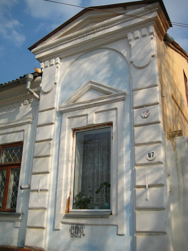 Бывший дом Элика Абрамовича